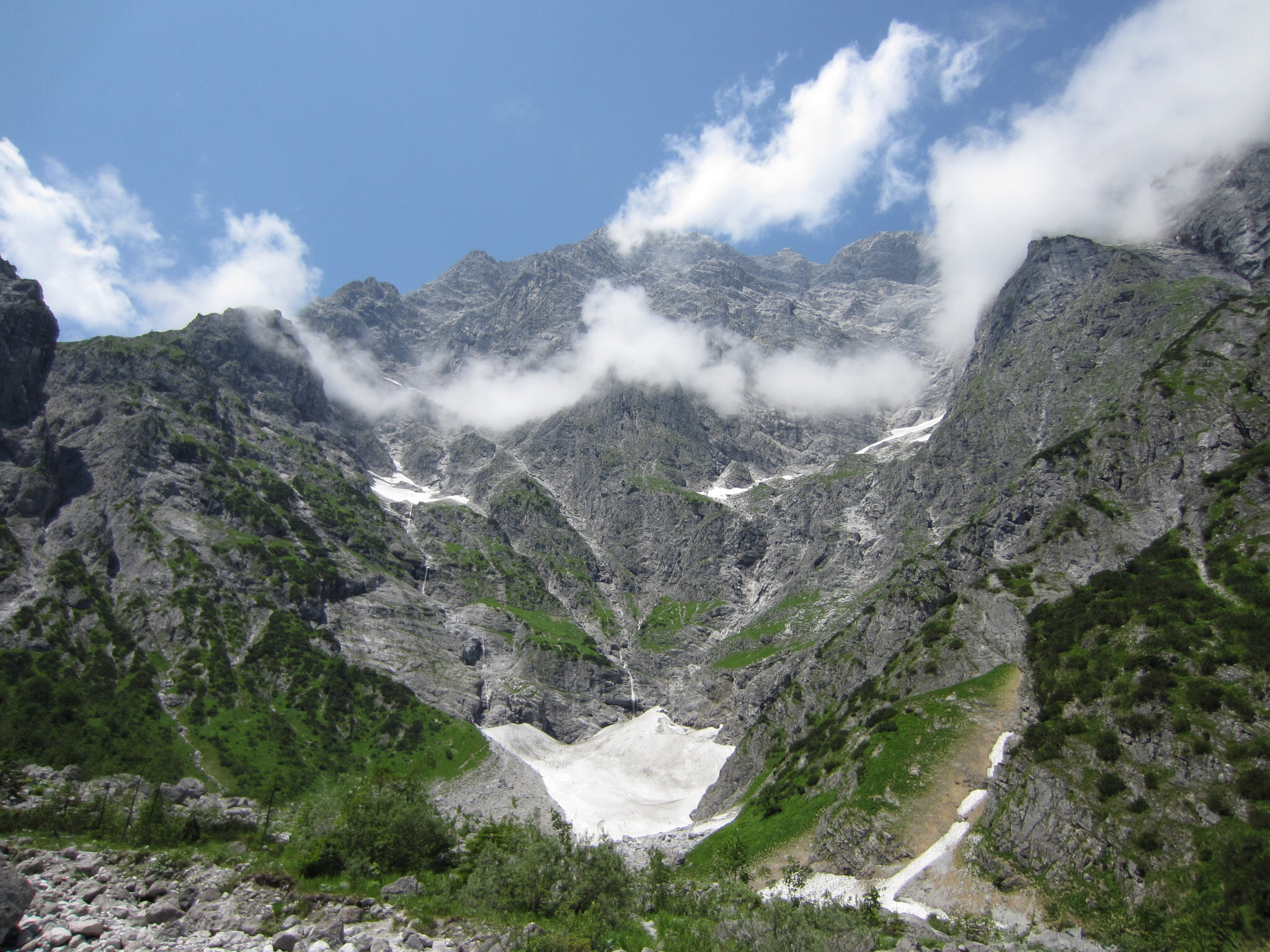 Bergpanorama Eishöhle im Nationalpark Berchtesgaden